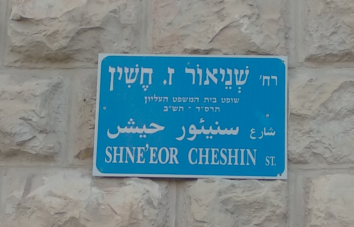 רחוב שניאור זלמן חשין בירושלים